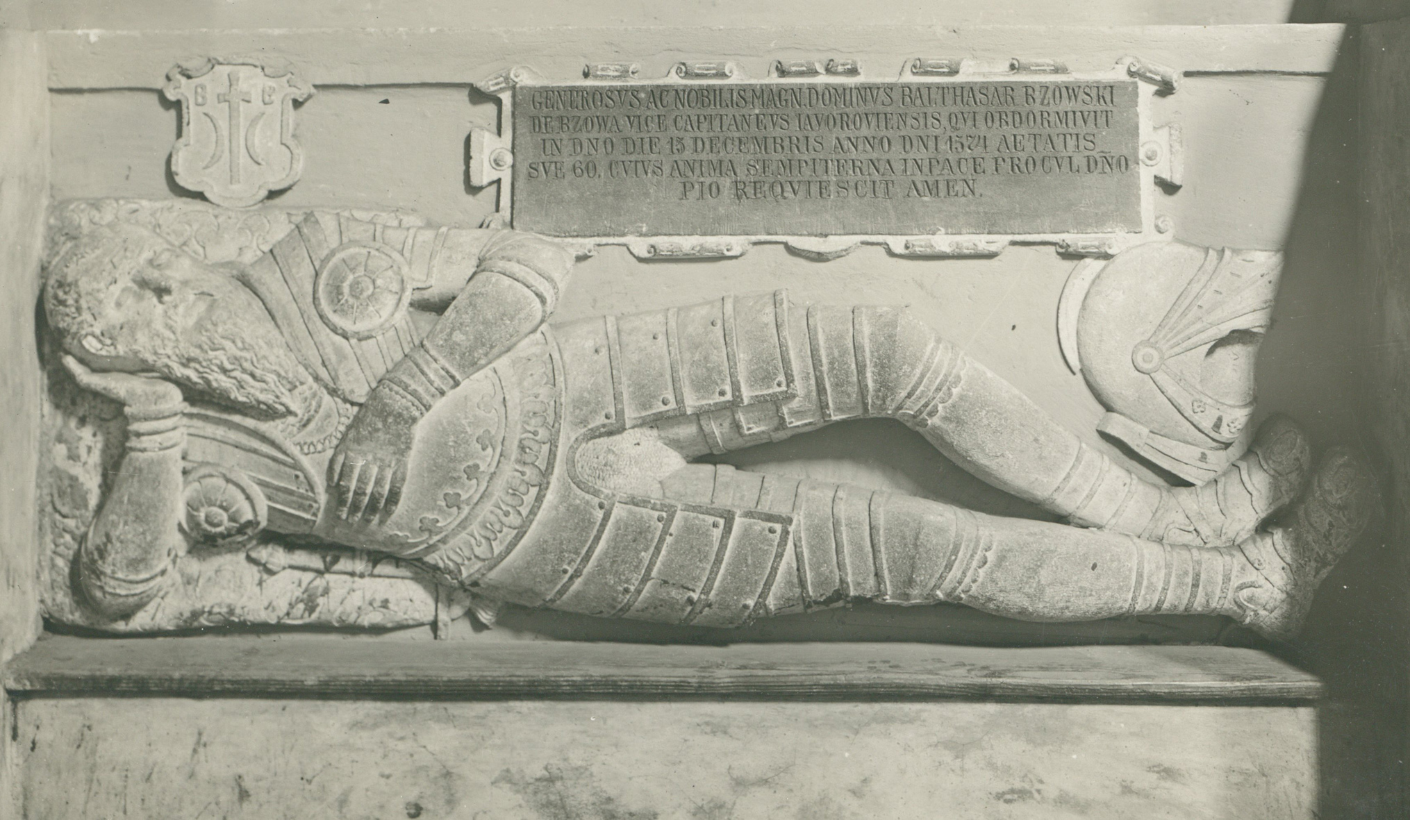 Nagrobek Baltazara Bzowskiego z katedry Wniebowzięcia NMP we Lwowie, fotografia z 1912 r. autorstwa Józefa Kościesza-Jaworskiego